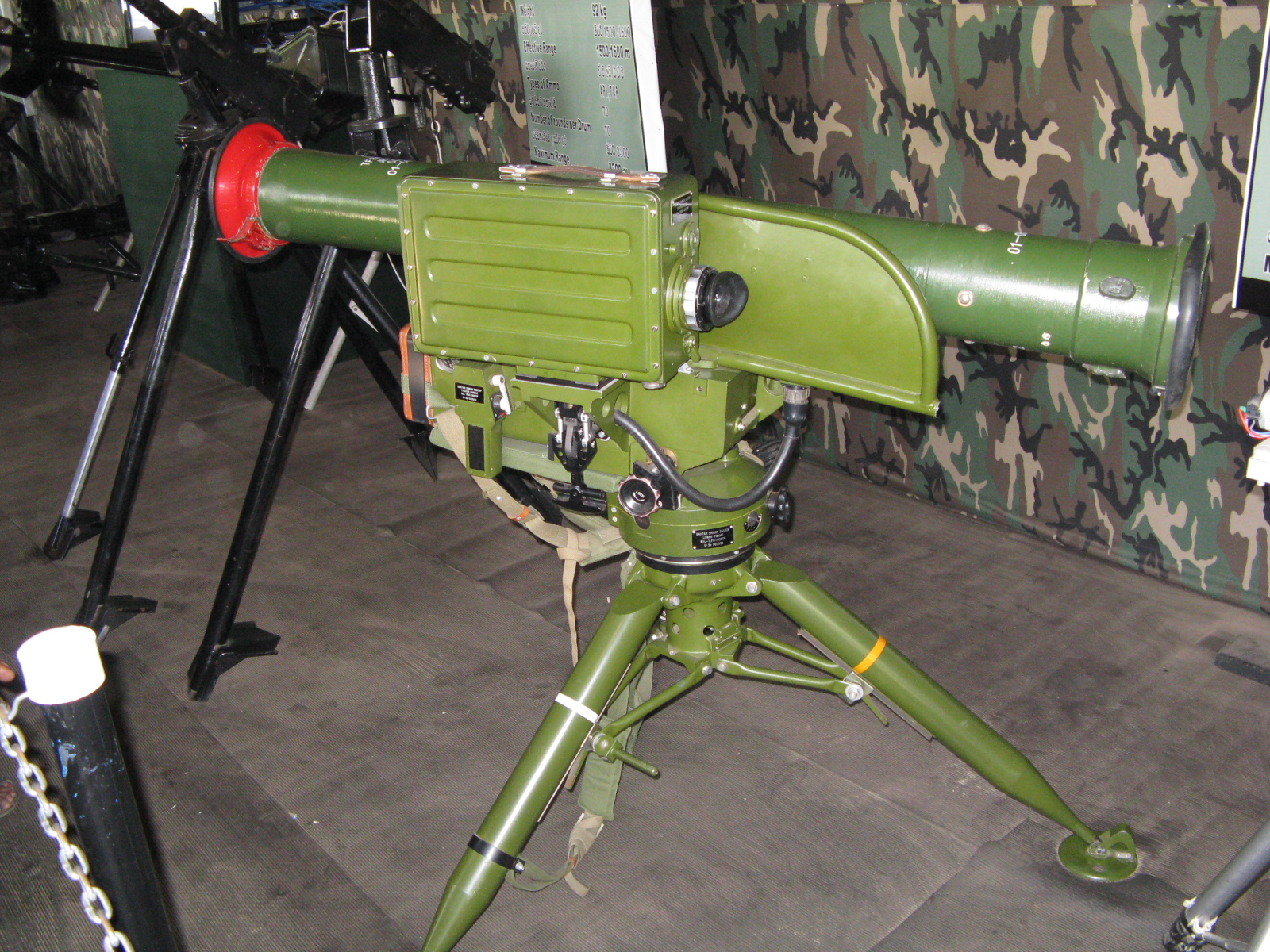 Baktar-Shikan Anti-Tank Guided Missile - Sri Lanka Army